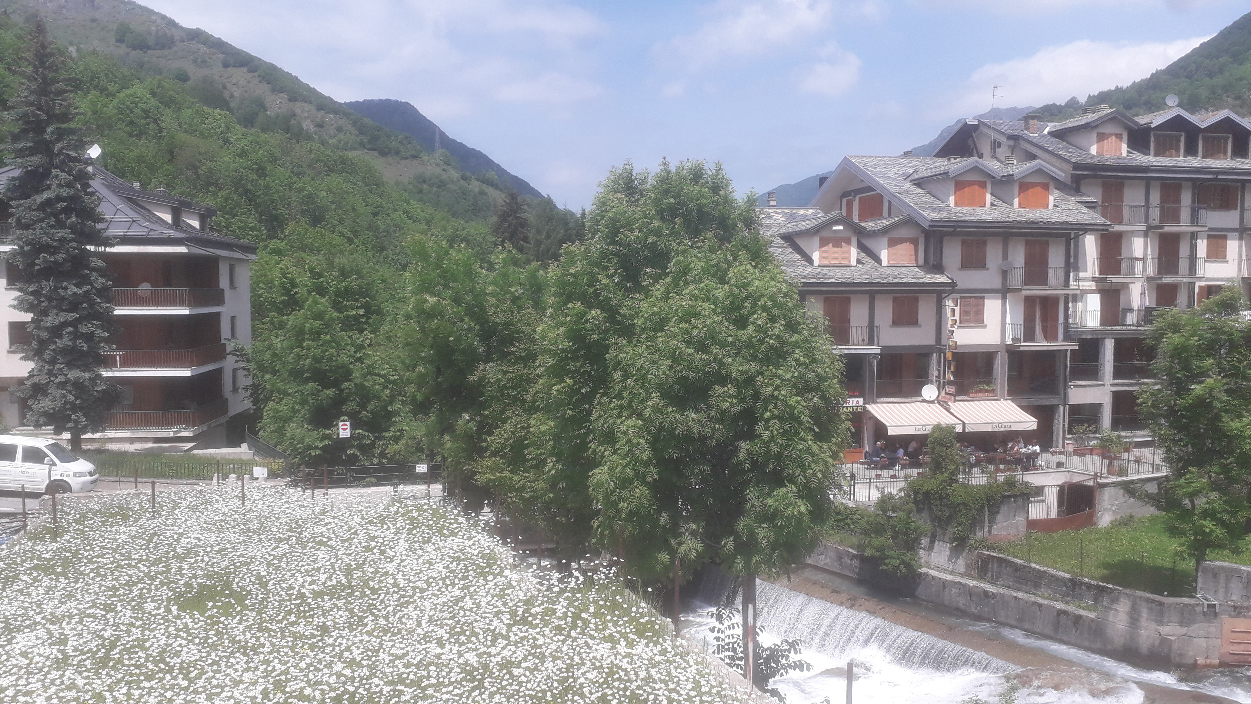 Scorcio di tarda primavera a Limone Piemonte (zona Via Molino Soprano).